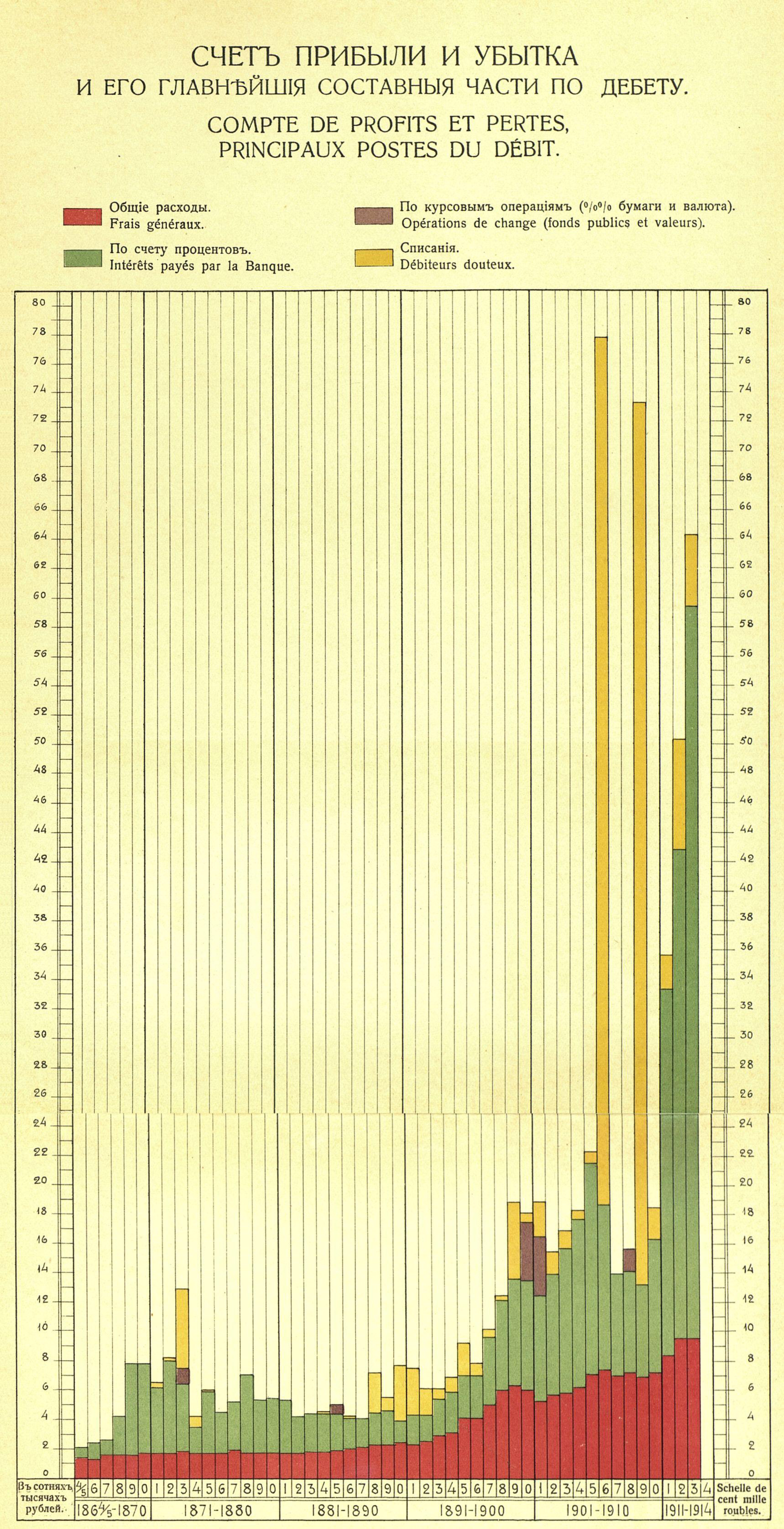 Убытки Санкт-Петербургского частного коммерческого банка, 1864-1914